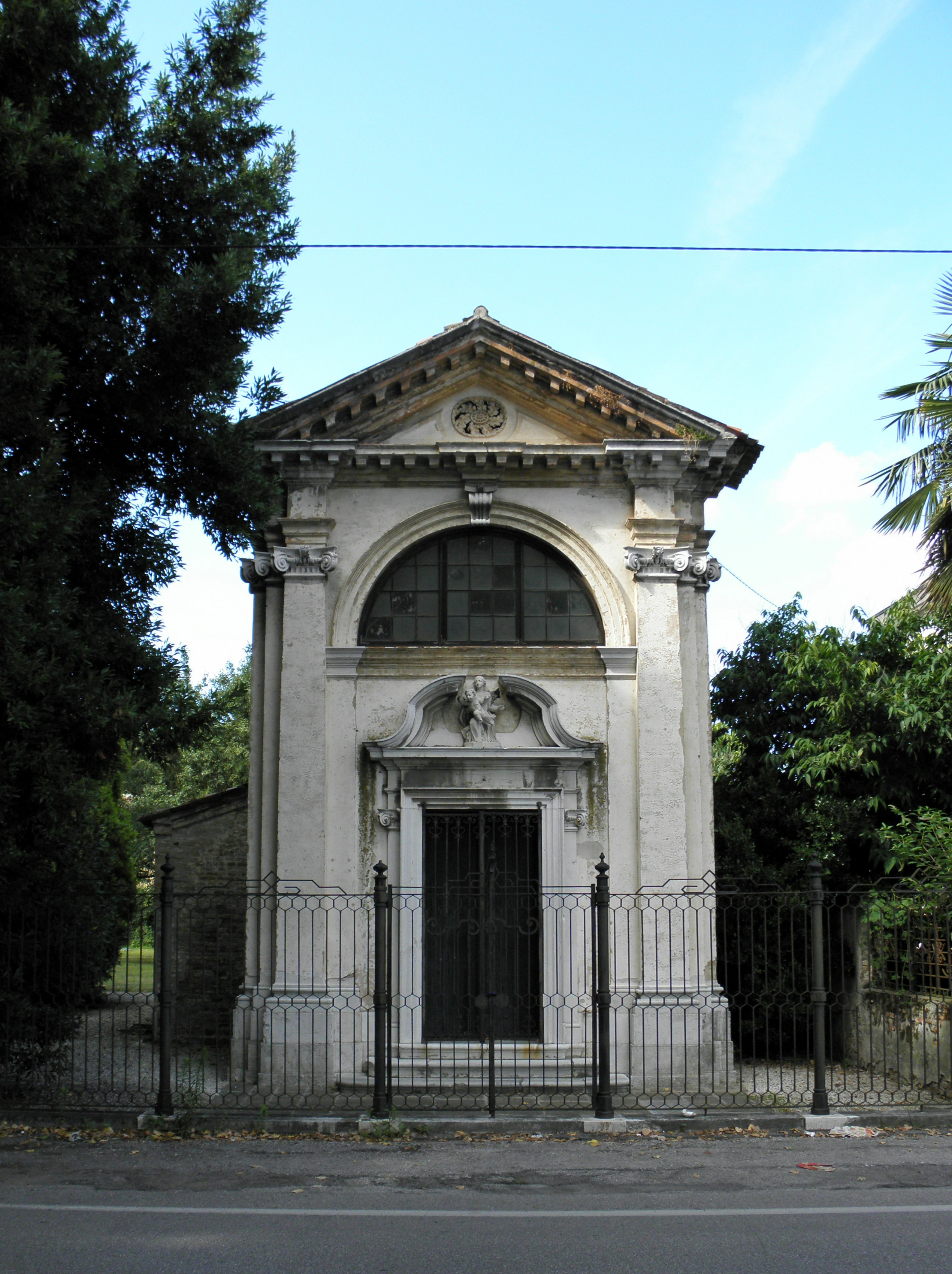 Carpenedo, frazione di Venezia nel tessuto urbano di Mestre: l'oratorio della Beata Vergine del Rosario, parte del complesso della Villa Malvolti.